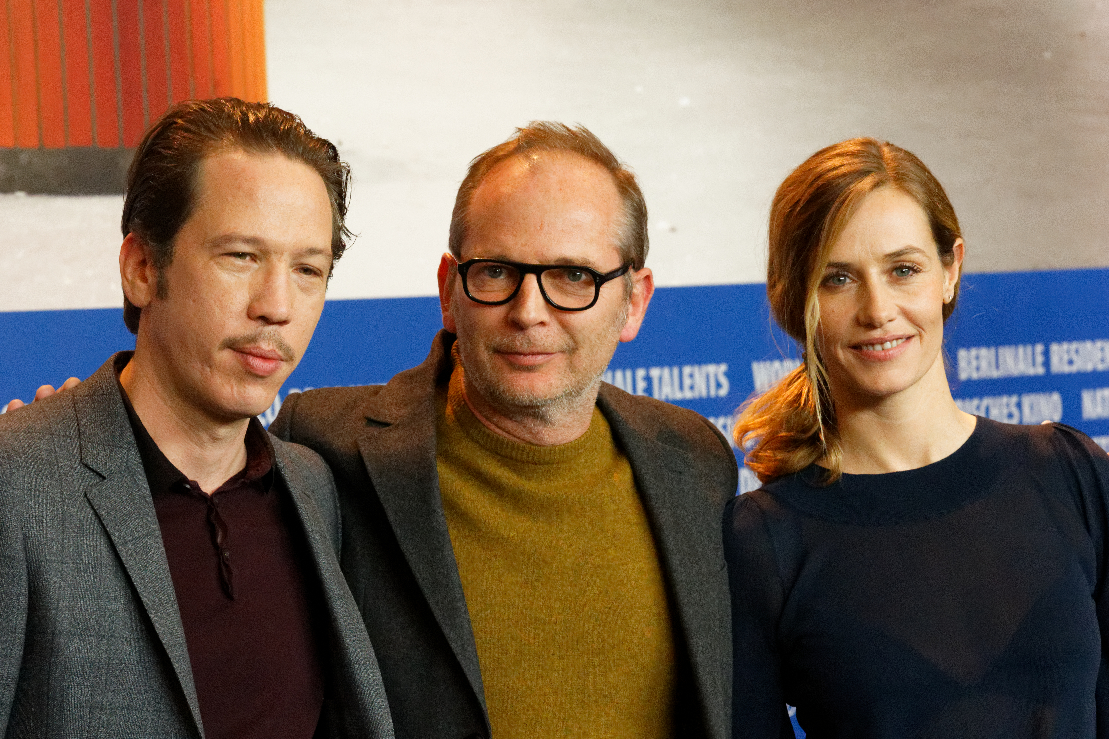 Reda Kateb, Étienne Comar und Cécile de France bei der Pressekonferenz zu Django bei der Berlinale 2017